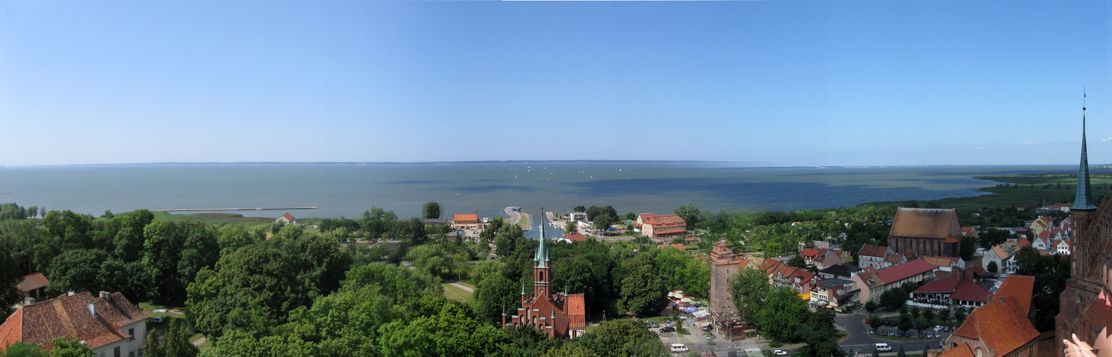 Panorama miasta z wieży Radziejowskiego.